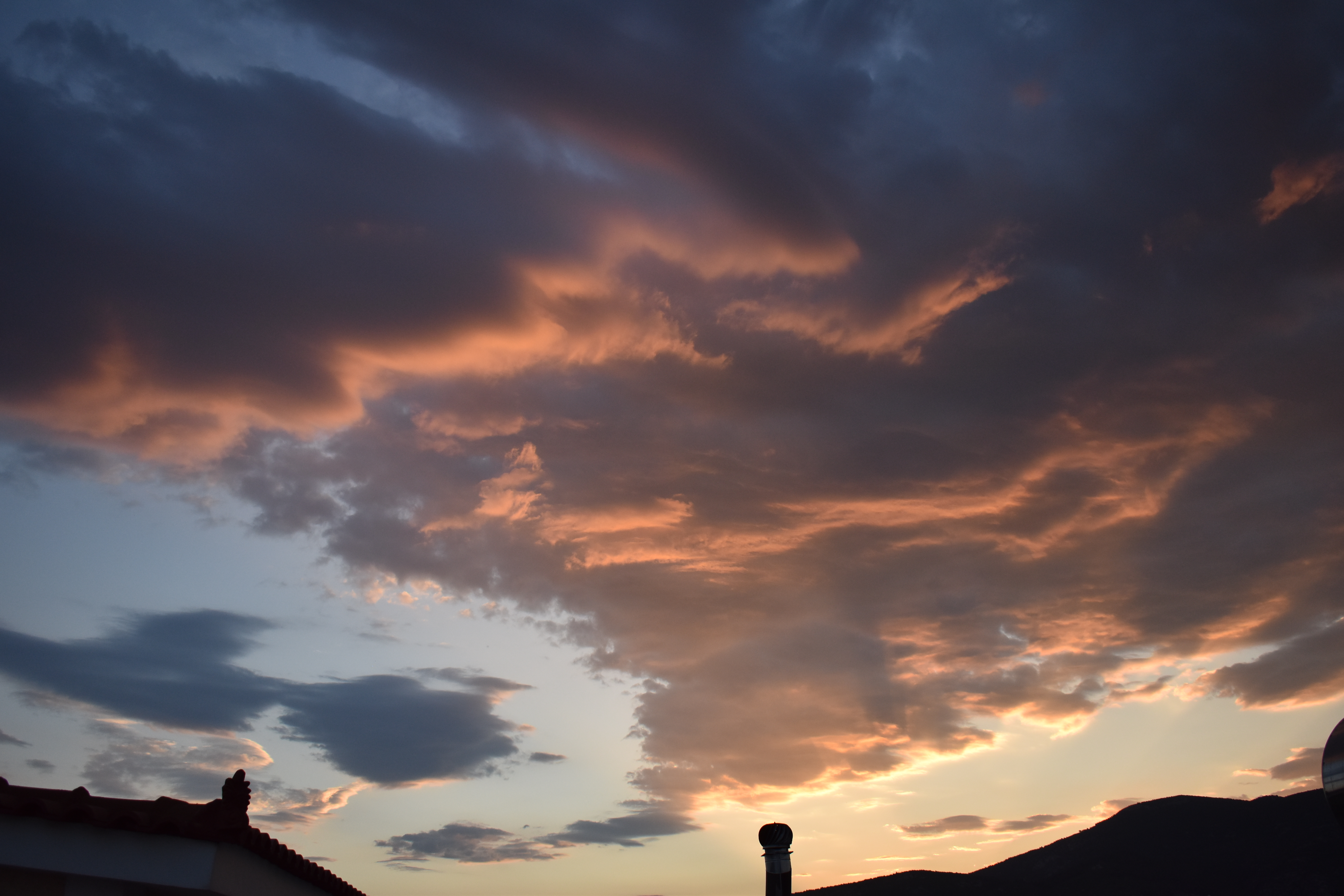 Το Μενίδι είναι ομορφότερο από ότι νομίζουμε